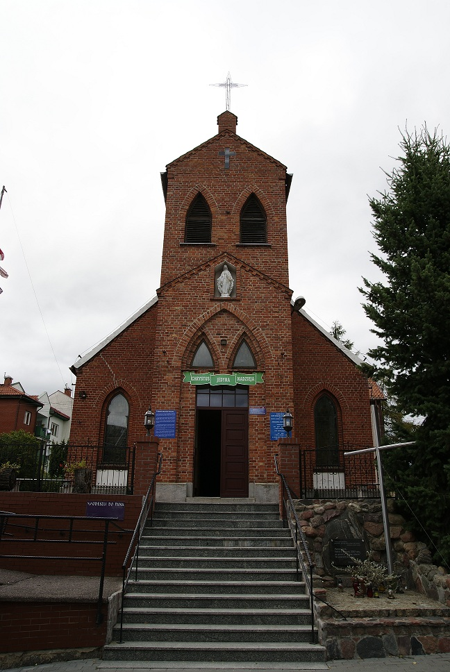 kościół parafialny pw. Matki Boskiej Różańcowej z przylegającym budynkiem Mikołajki, ul. Kajki 27, Mikołajki (miasto)